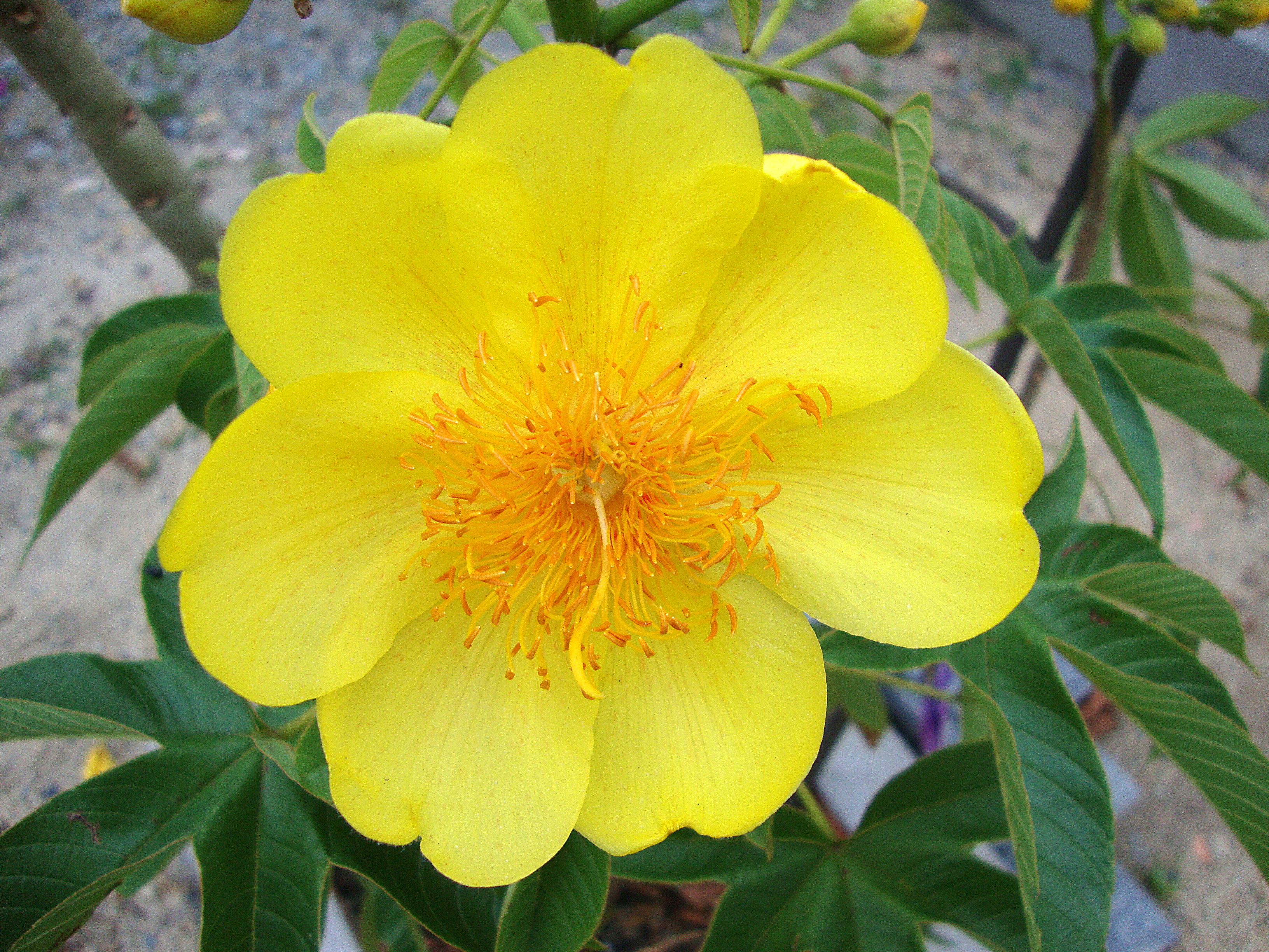 Cochlospermum religiosum (L.) Alston, 1931Tiếng Việt: Mai hoa đăng